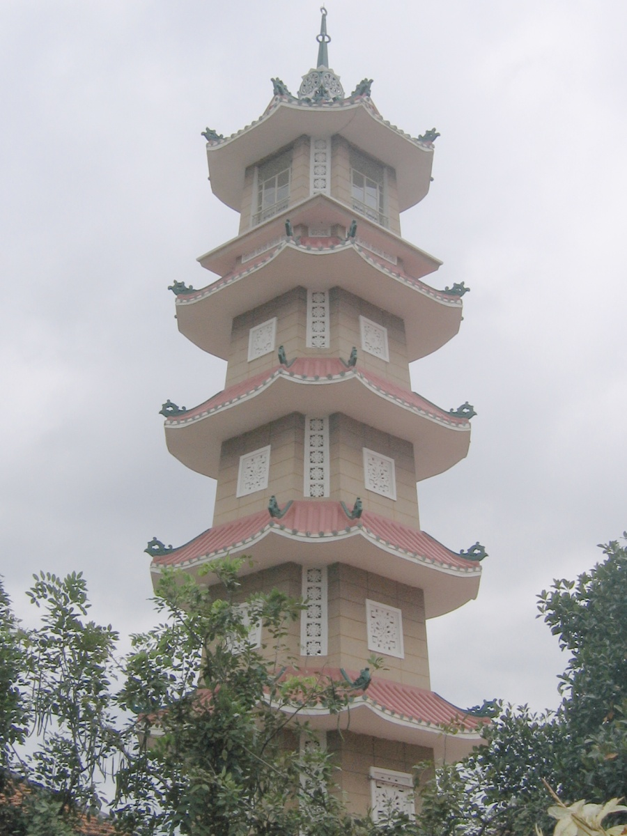 Xa Loi Pagoda in Ho Chi Minh City, Vietnam.